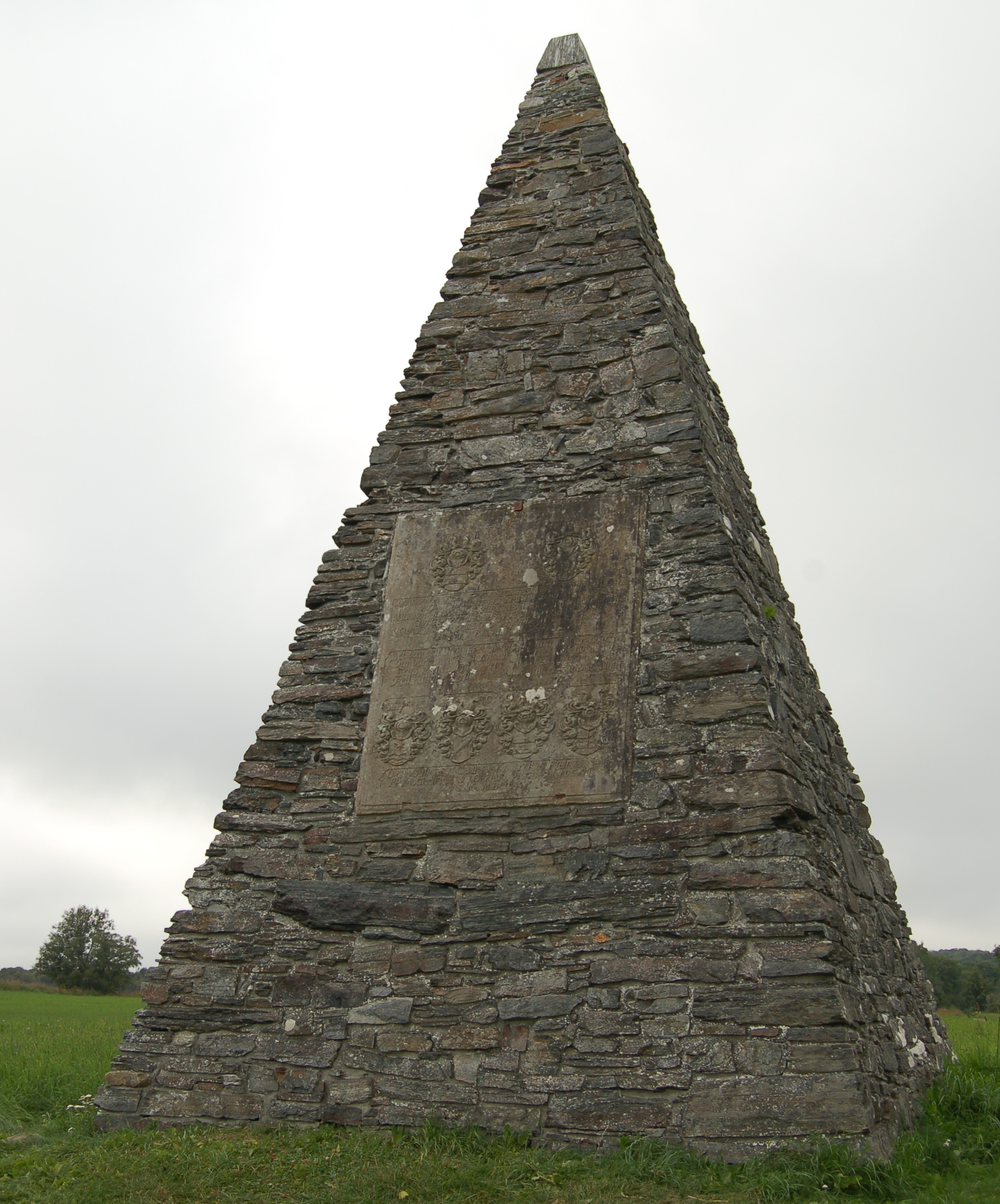 Pyramiden Austråttborgen